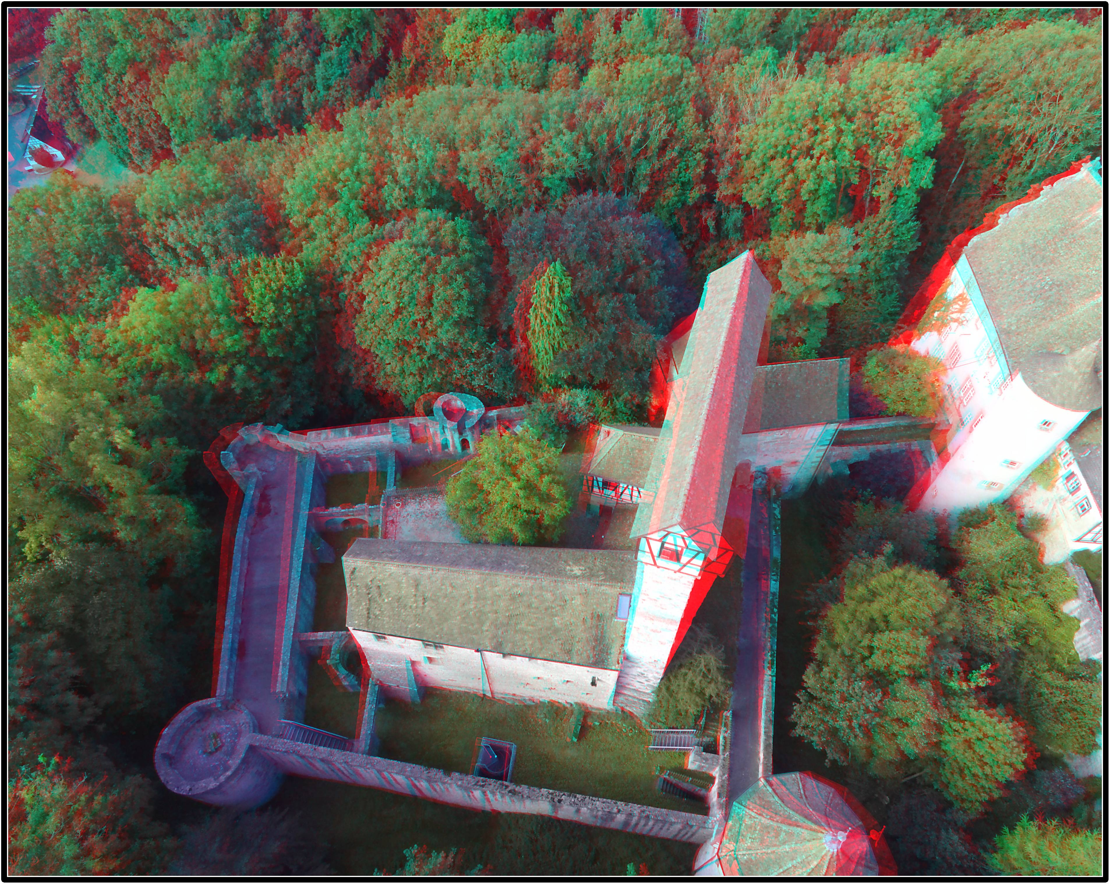 Ansicht der Burg Amlishagen in 3 D (rot-grün/blau Brille)